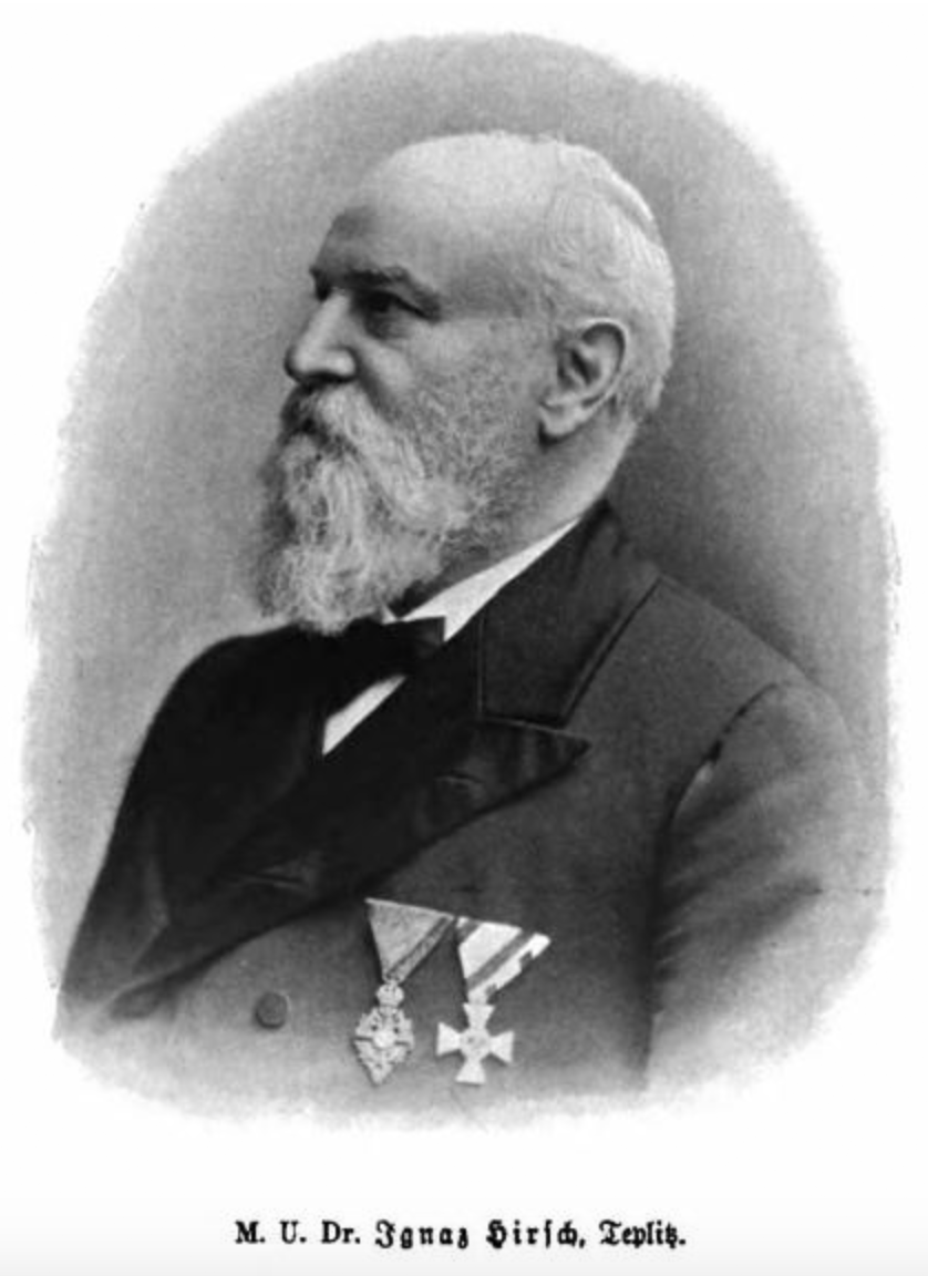 Dr. Iganz Hirsch (1834–1910)